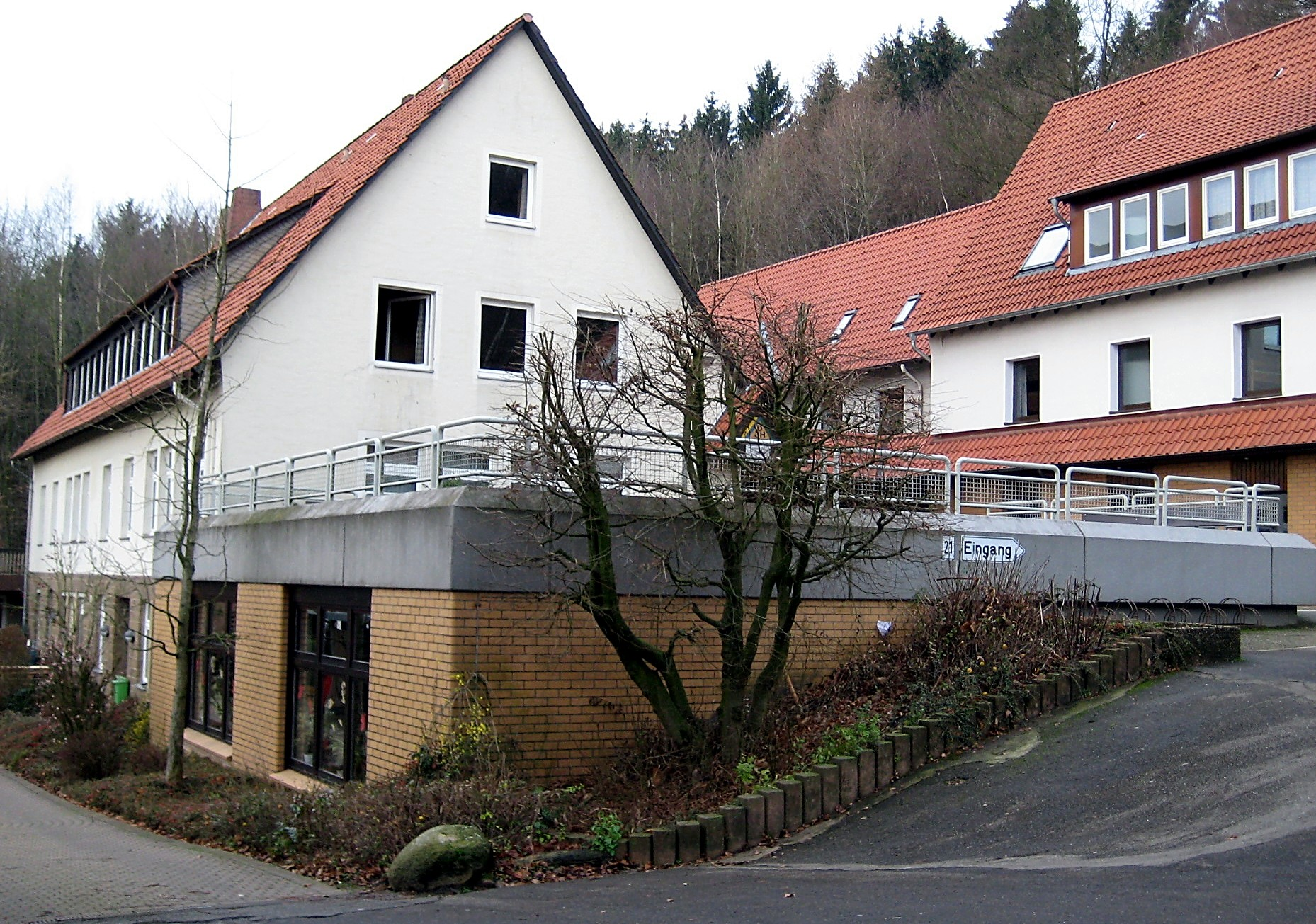 DJH in Rödinghausen, Kreis Herford, Nordrhein-Westfalen.